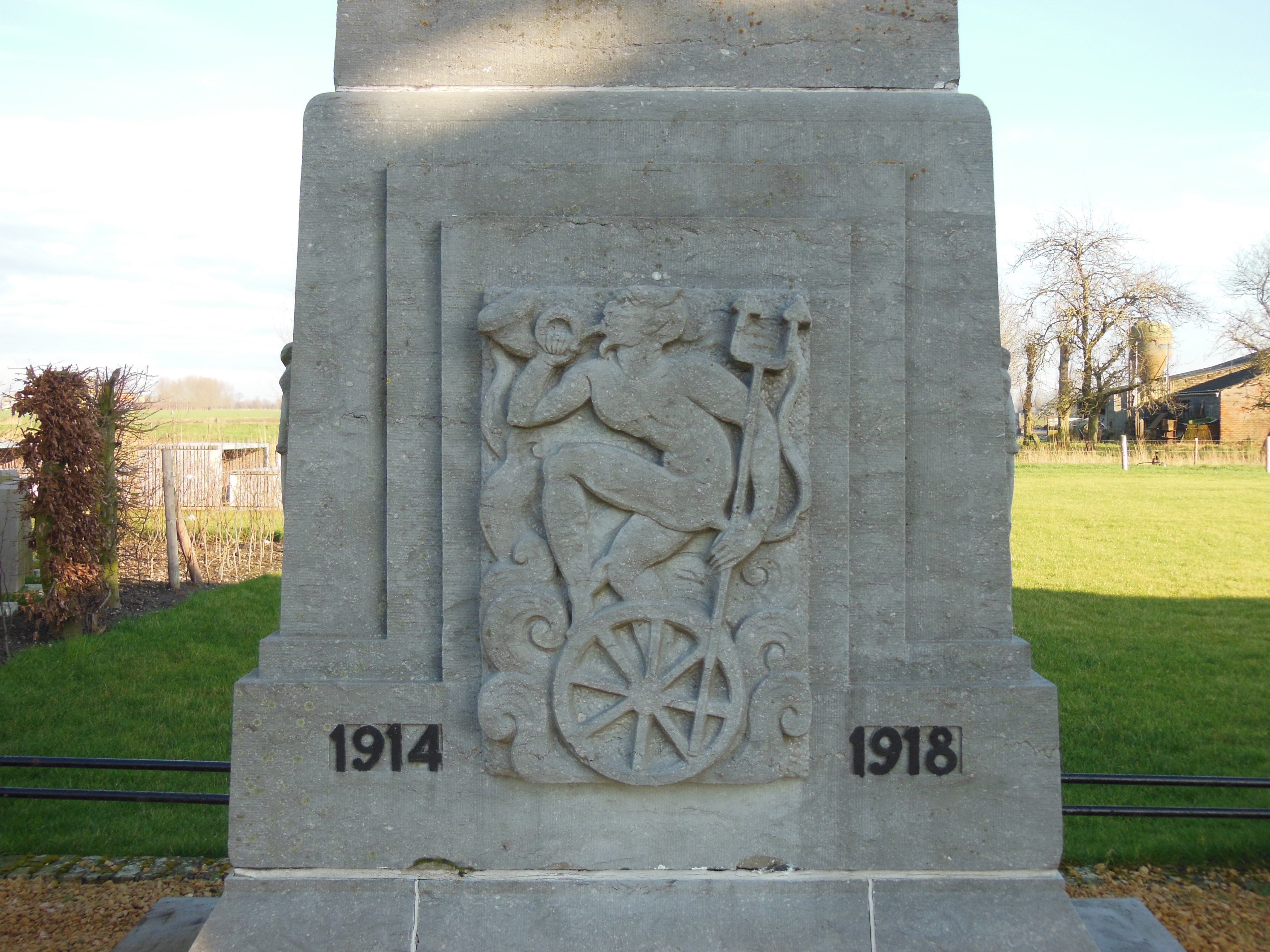 Een afbeelding van het wapenschild van de Karabiniers-Wielrijders op de sokkel van het Karabiniers-Wielrijders monument